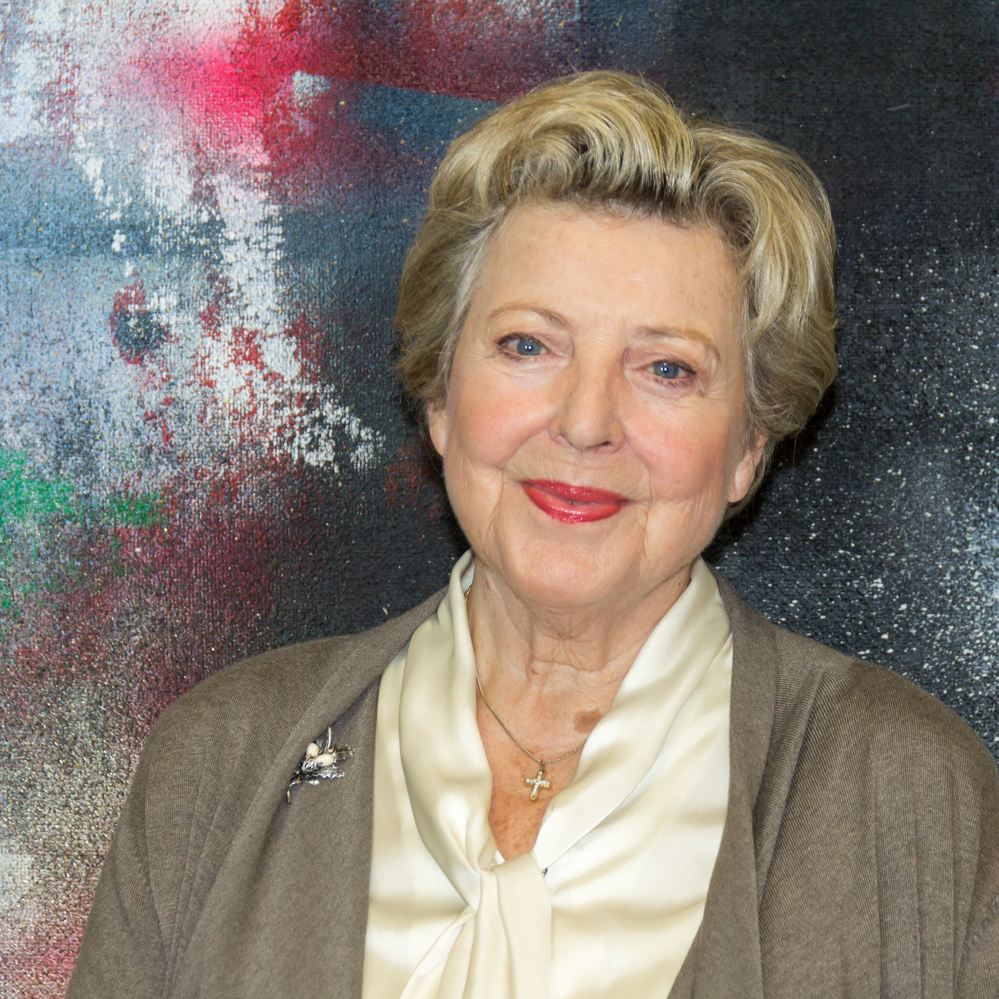 Pressetermin 30 Jahre Lindenstraße - Marie-Luise Marjan